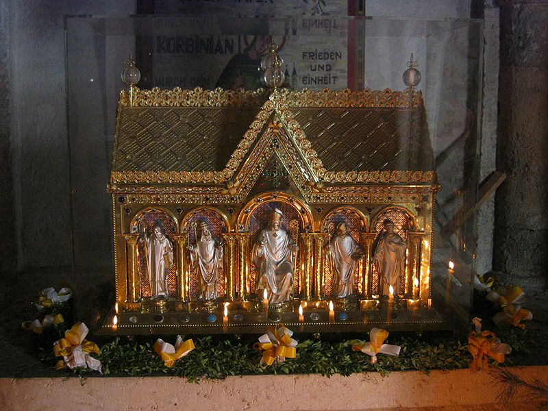 Korbiniansschrein in der Domkrypta (1861)